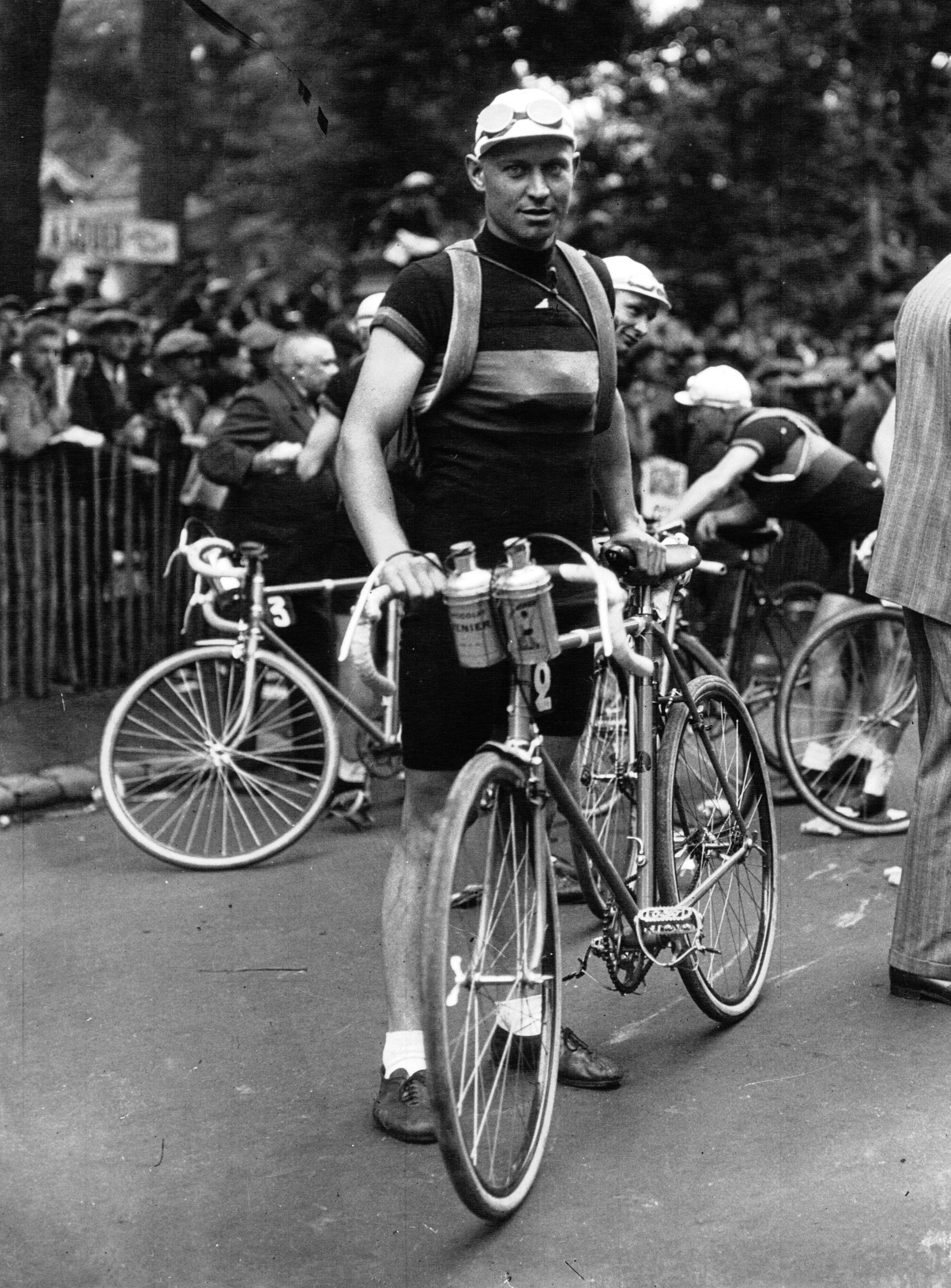 Alfons Schepers lors du Tour de France 1932